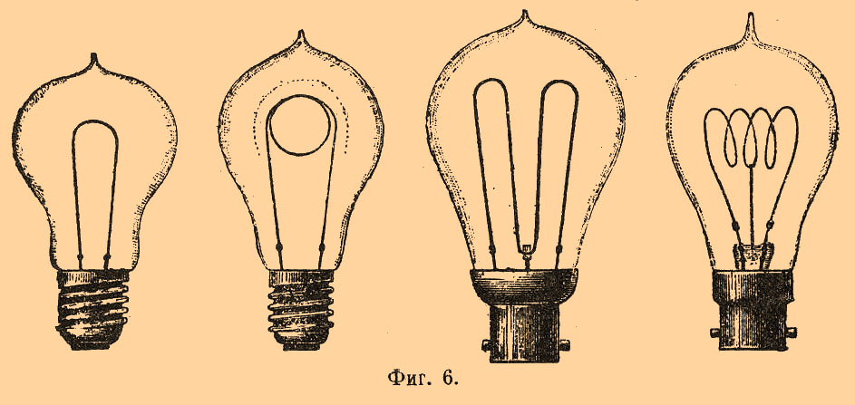 Иллюстрация к статье Электрическое освещение из энциклопедии Брокгауза и Ефрона